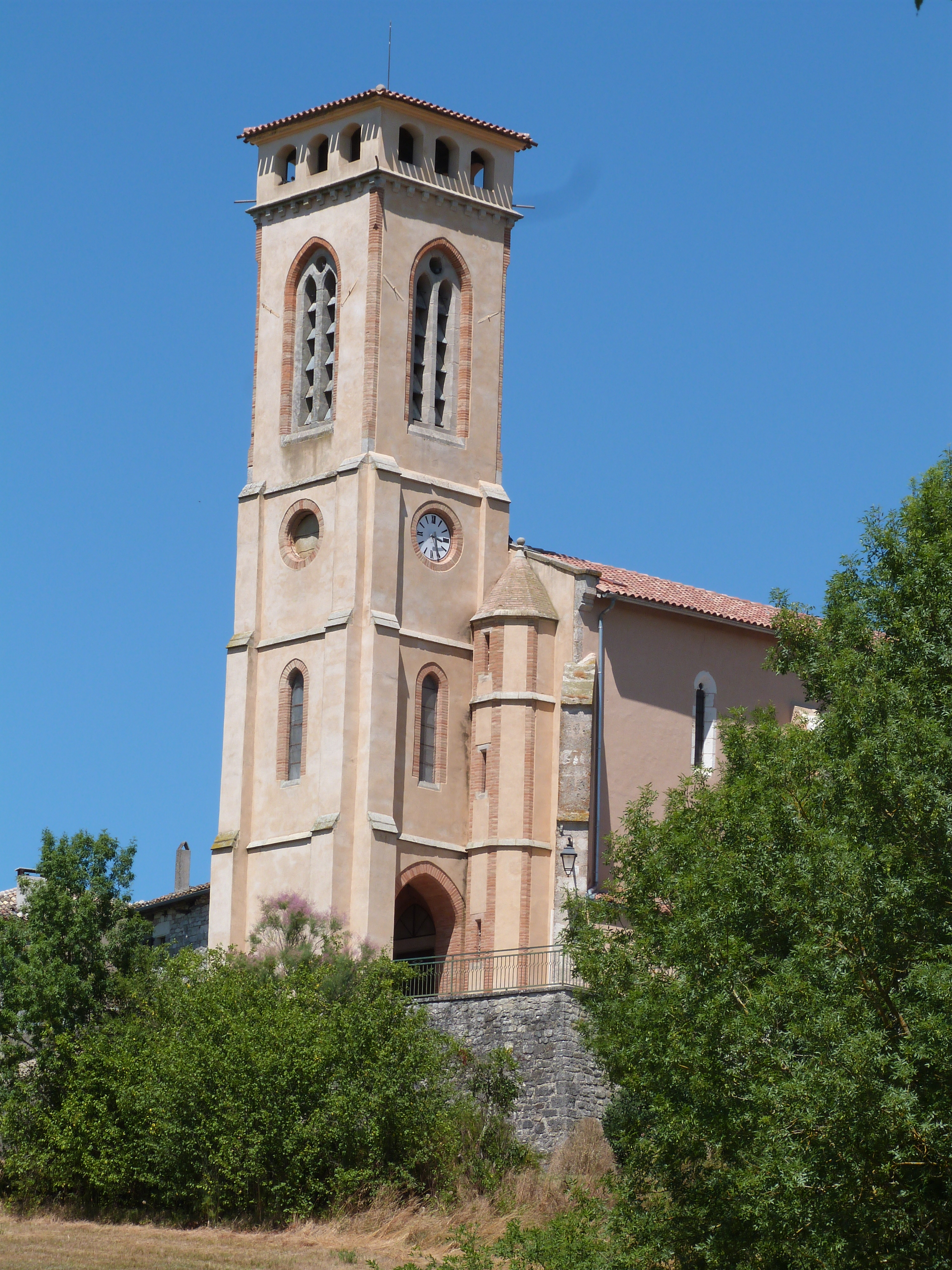 Clocher-porche de l'église Saint-Paul-Saint-Pierre (Le Verdier, Tarn)